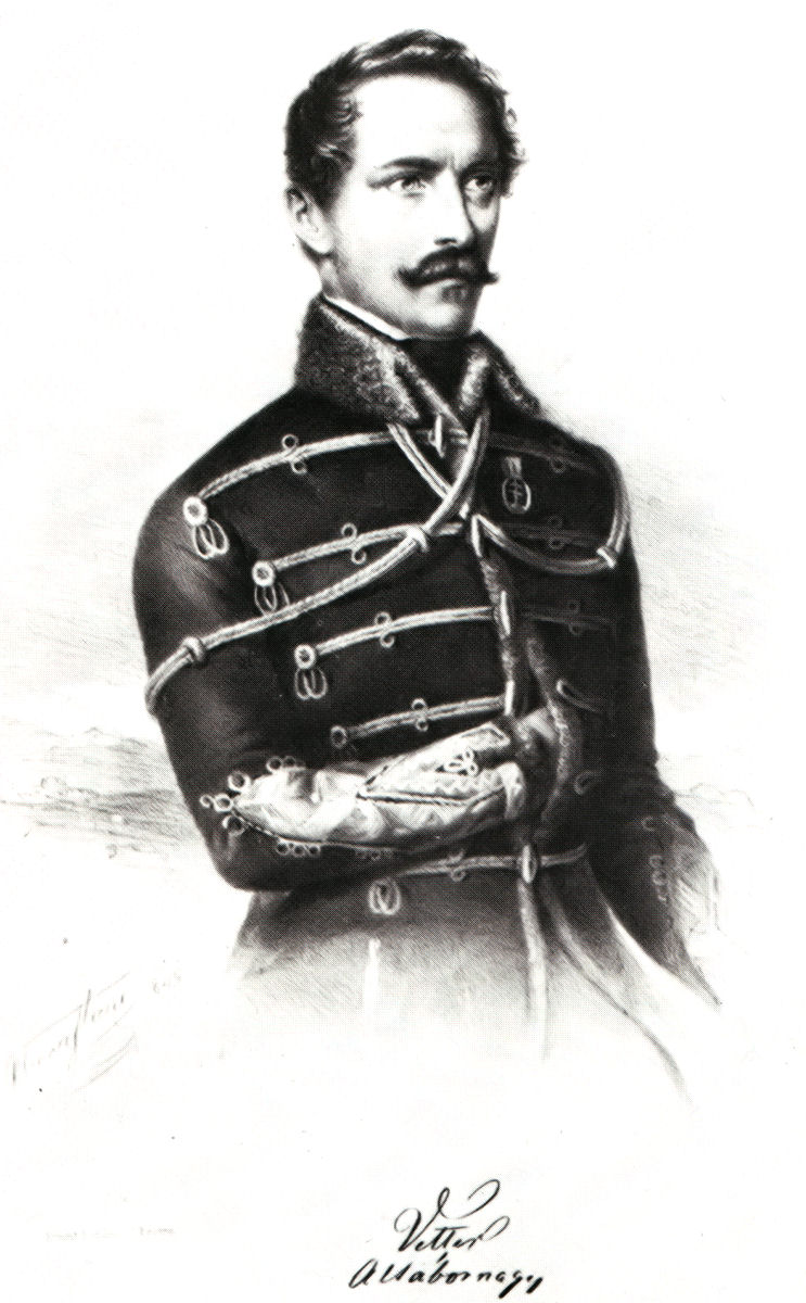 Vetter Antal altábornagy.